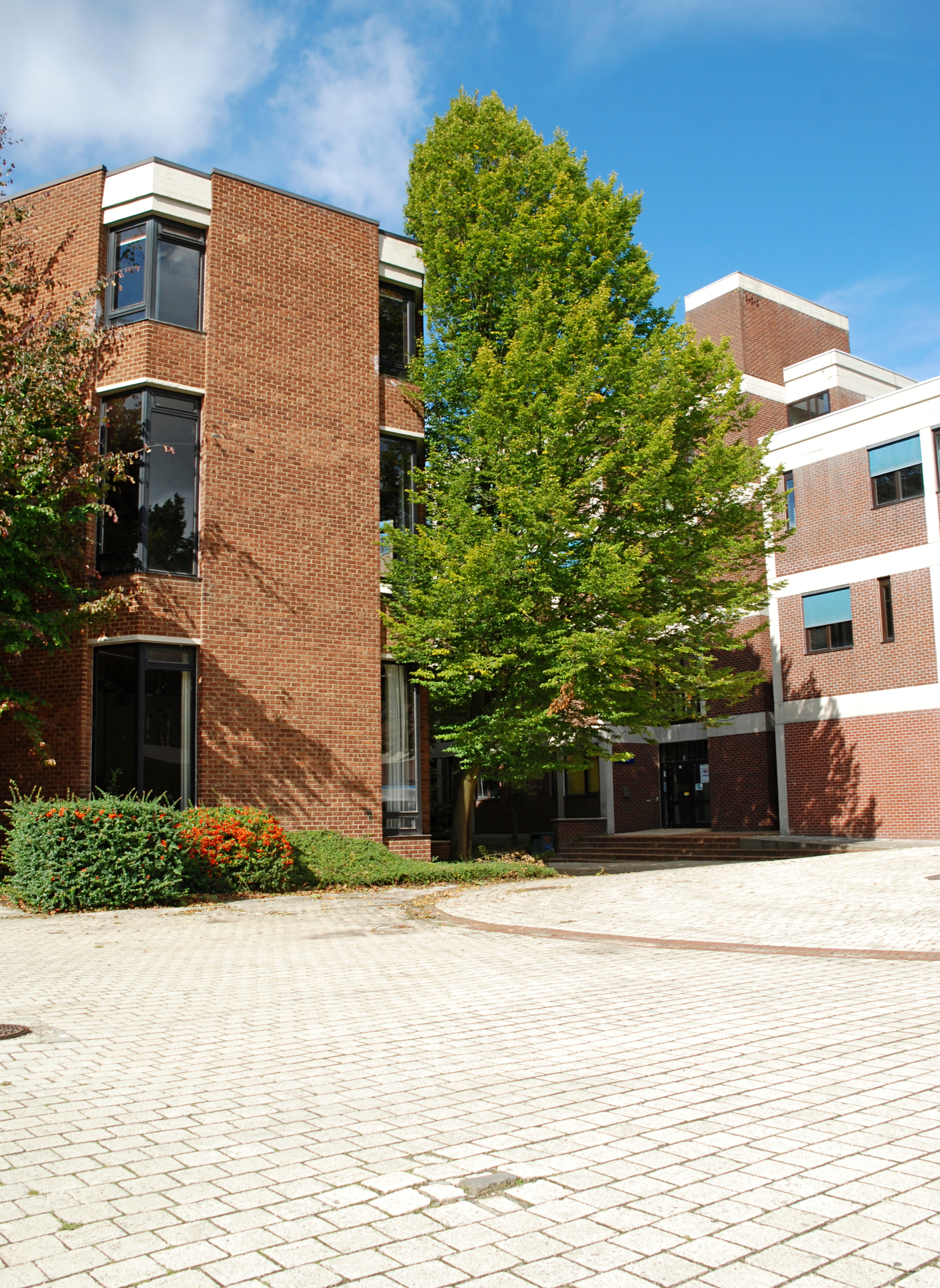 Belgique - Brabant wallon - Louvain-la-Neuve - Place Sainte-Barbe (architecture brutaliste, début des années 1970) This photo of immovable heritage has been taken in the Walloon Region